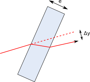 Translation d'un faisceau avec une lame à faces parallèles.